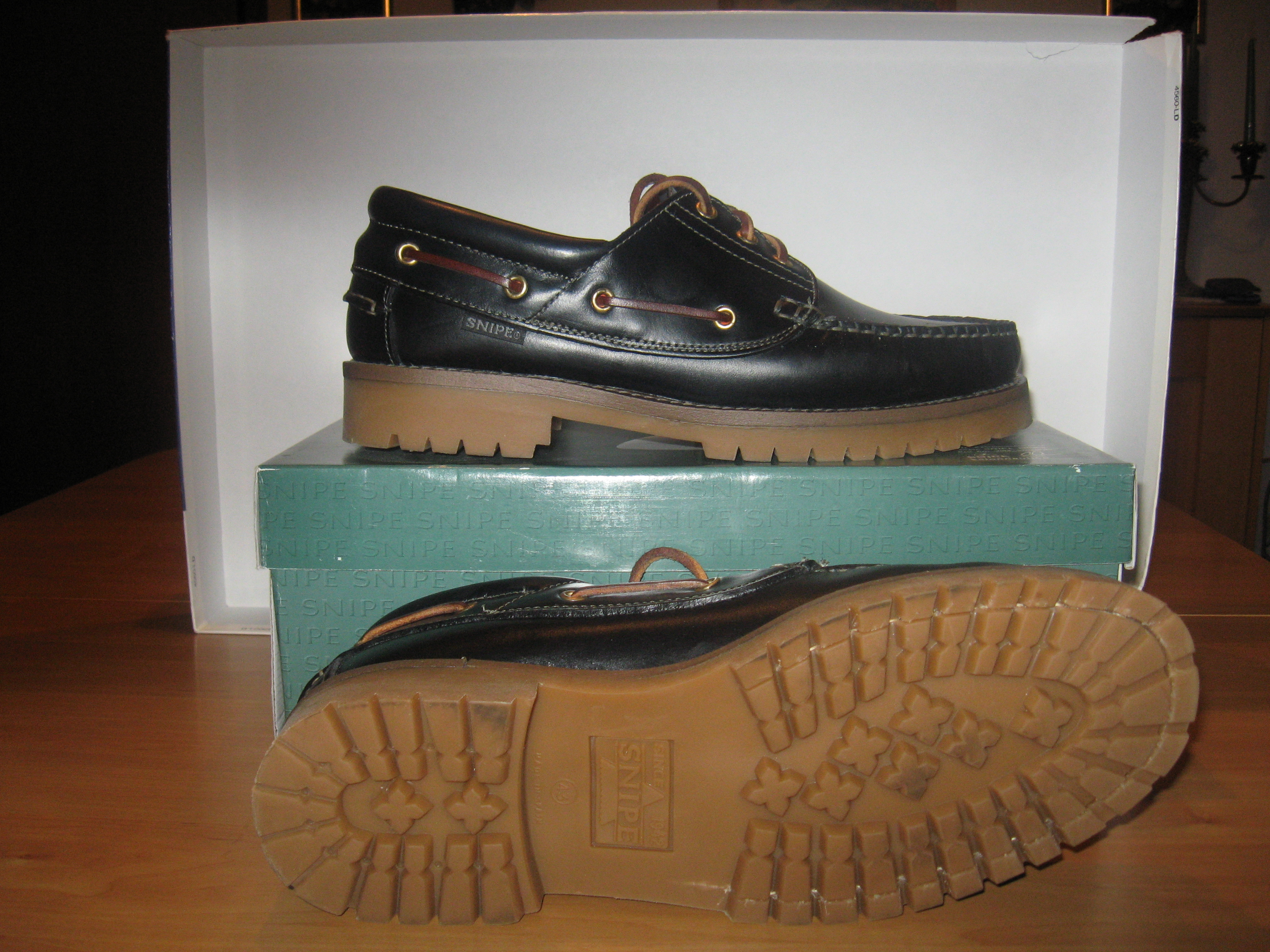 Ein robuster Bootsschuh in der seitlichen Ansicht